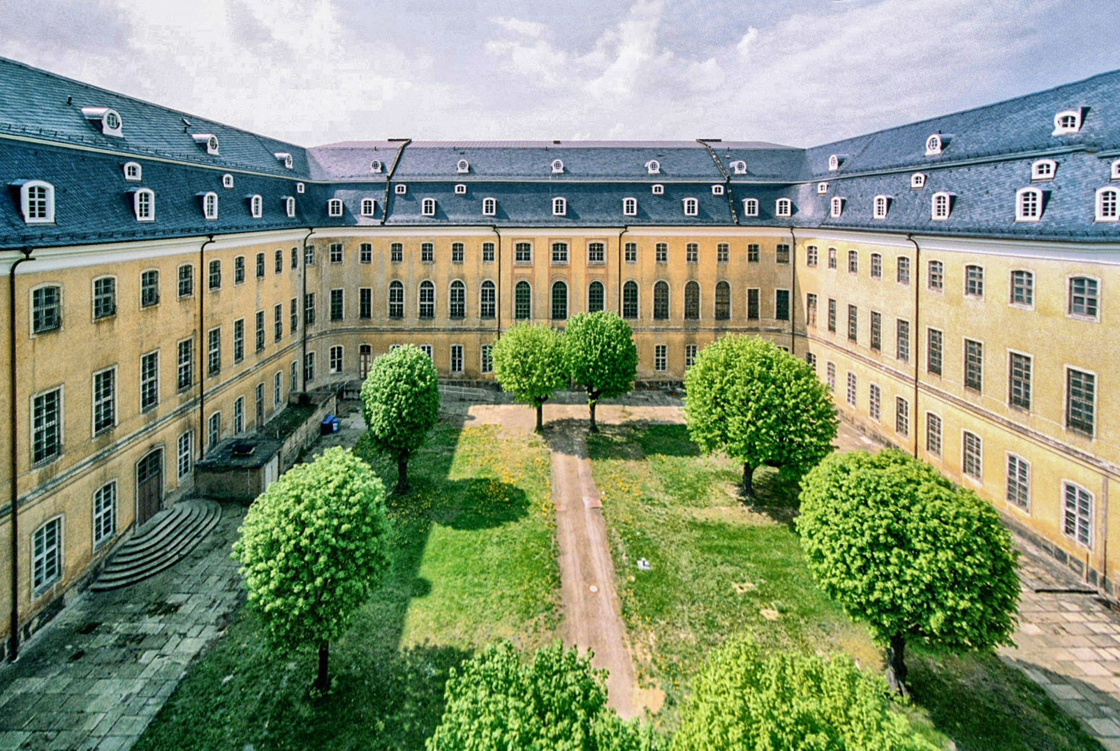 Schloss Hubertusburg Wermsdorf Innenhof 2004 abgeleitete Arbeit, Perspektive korrigiert